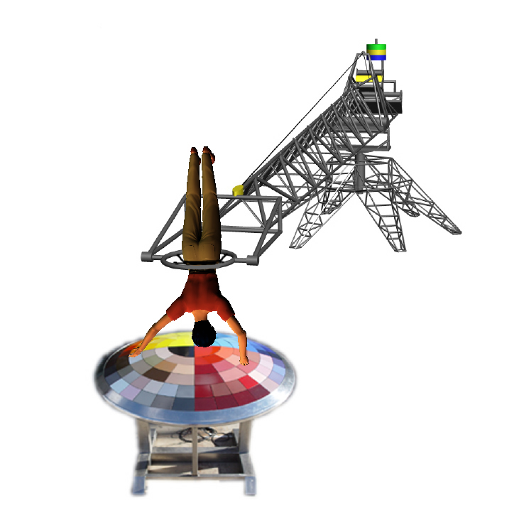 Structure de compensation du poids du corps, permettant à l'utilisateur de naviguer autour d'un point zéro. Déplacement vertical de 0 à 10 mètres par simple appel du pied, et circulaire de 0 à 50 mètres (diamétre) par déport à l'impulsion. Analyse des déplacements du corps dans l'espace sur 8 axes pour piloter en temps réel 8 synthétiseurs virtuels autonomes. Assistance motorisée sur 2 axes (circulaire vertical sur 45° limité et circulaire horizontal sur 360°- illimité) pilotée à partir de la ceinture de vol et débrayable, pour passer du mode autonome (équilibre autour du point zéro) au mode automatisé. Structure modulaire par partie de 3 mètres permettant des installations en salle moyenne 6 métres ou en plein air, plus de 24 métres. Cet instrument sculpture rentrera dans la famille des OMNI, il aura donc cette double vocation d'être à la fois un instrument high tech pour virtuose du vol sonore et un instrument au service de tous les publics et principalement dans la continuité des activités OMNI avec les scolaires et les enfants handicapés. Instrument destiné à l'événementiel, au spectacle, à la musicothérapie. Arcelor Mittal - Stainless Europe, partenaire officiel Sponsor officiel pour la construction - fourniture de l'ensemble des Matériaux - assistance à la maitrise d'ouvrage, à la construction, la logistique, la communication. ISSF (International Stainless Steel Forum). Assistance en collaboration avec Arcelor pour la communication et l'événementiel international. Avec la collaboration du danseur chorégraphe Julio AROZARENA (danseur chorégraphe de Zingaro-Bartabas pour "Eclipse" et "Triptyk", actuellement danseur et maître de Ballet du Béjart Ballet Lausanne) pour les essais, l'écriture chorégraphique et les spectacles "Moon Jump".